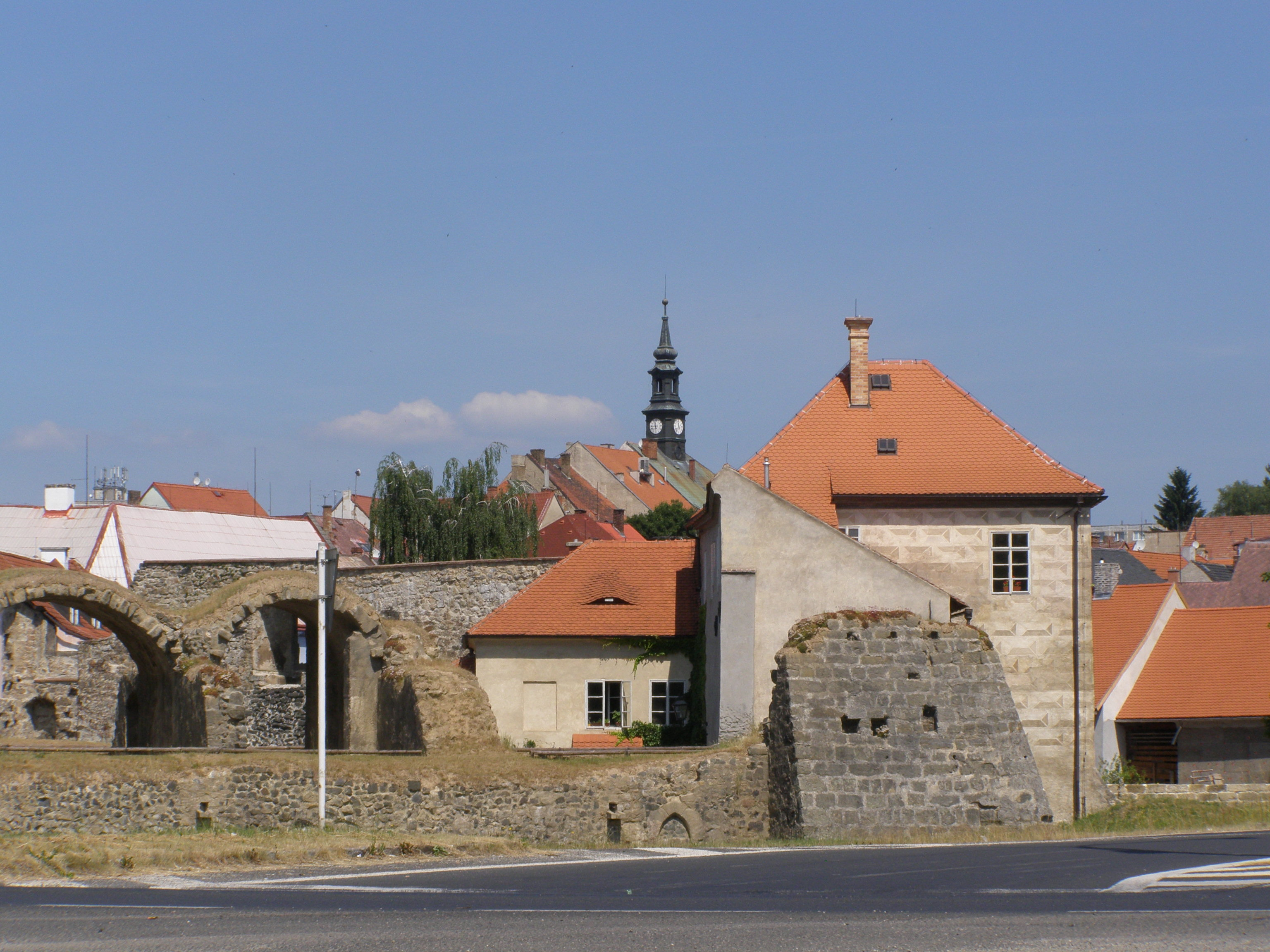 Česky: Česká Lípa, hrad Lipý v ulici Děčínská